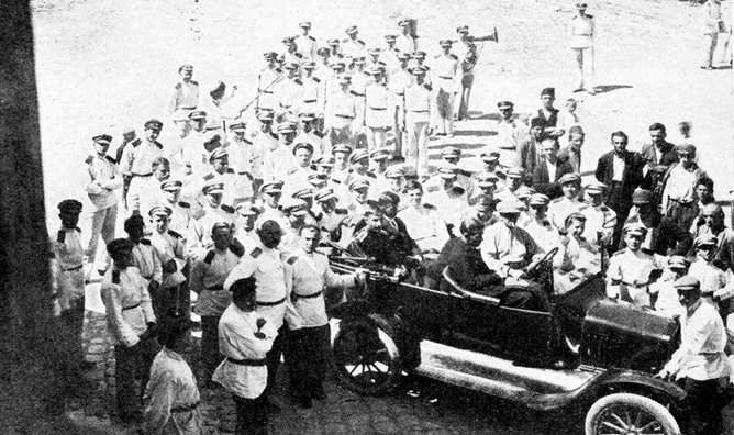 Српски (ћирилица): Војна парада руских питомаца главном билећком џадом